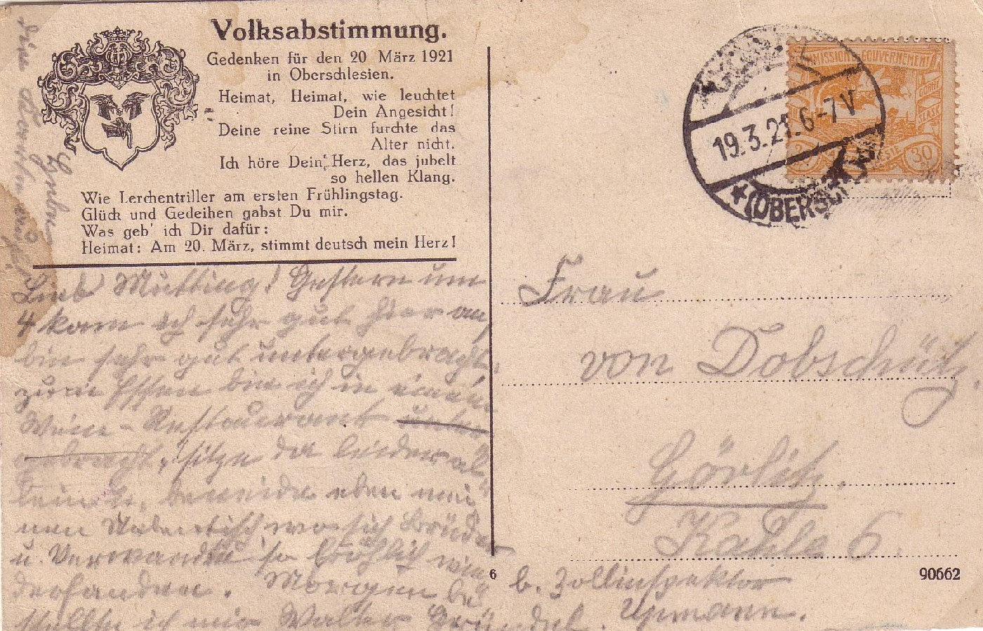 Postcard "Volksabstimmung in Oberschlesien" (Upper Silesia). Postkarte zur Volksabstimmung in Oberschlesien, geschrieben von der Malerin Erna von Dobschütz am 19. März 1921; Das Wappen mit den drei Böcken stellt das Stadtwappen der Stadt Cosel (Kędzierzyn-Koźle) da. Am Poststempel erkennt man, dass der letzte Buchstabe ein "L" ist, somit handelt es sich um die Stadt Cosel.